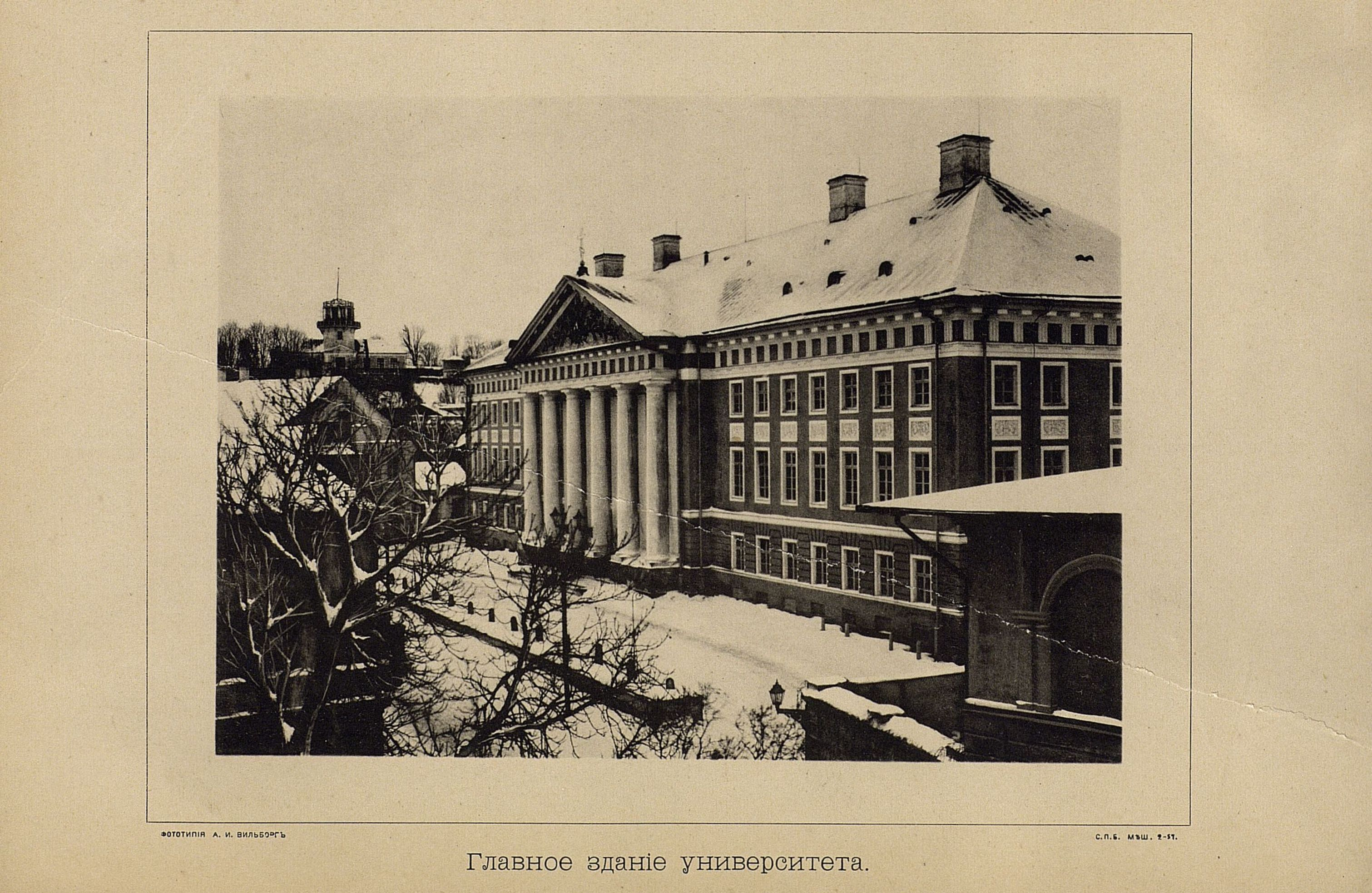 Юрьевский университет, бывший Дерптский — учрежден в 1802 году (фотография)